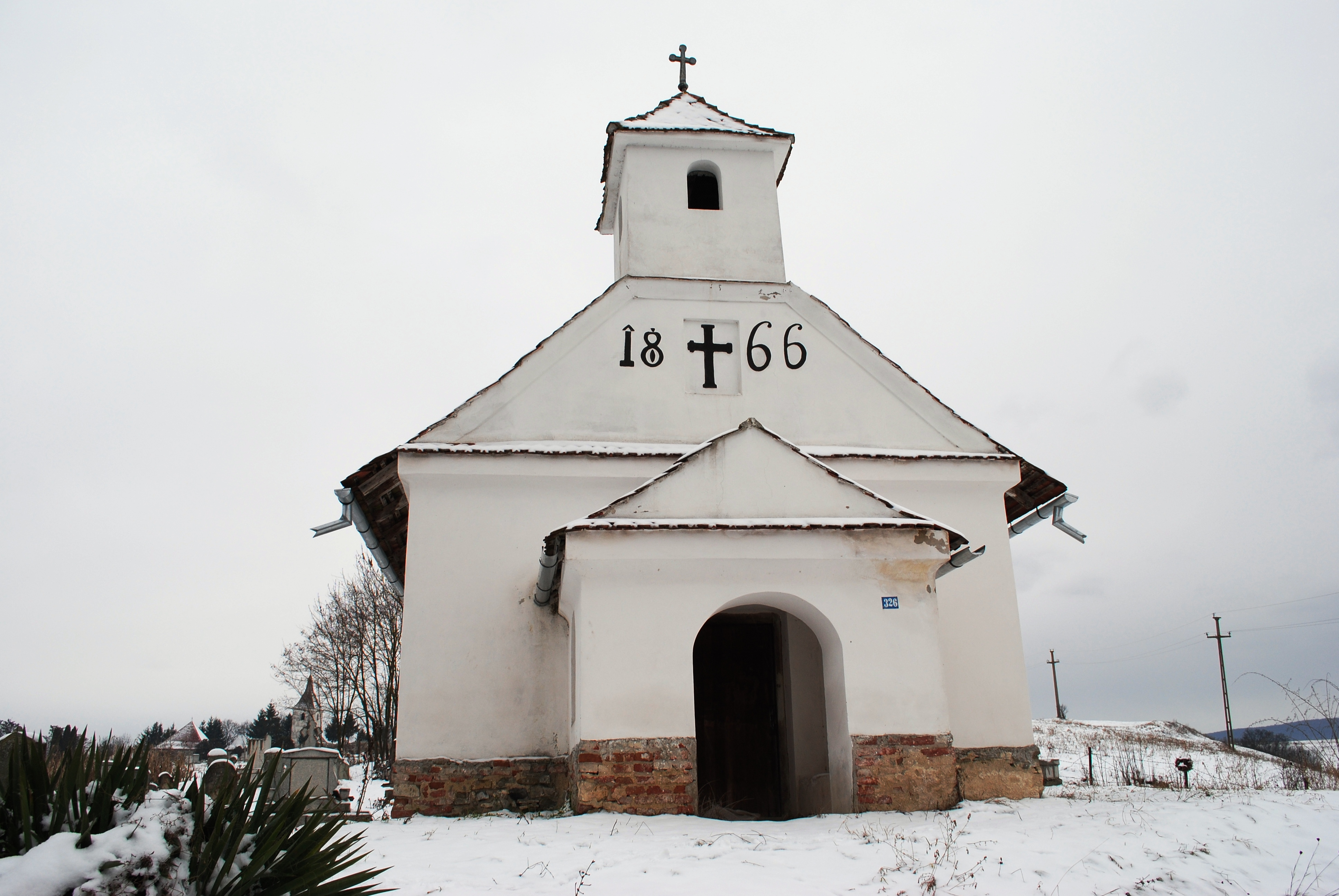 Biserica "Sf. Gheorghe" 1866